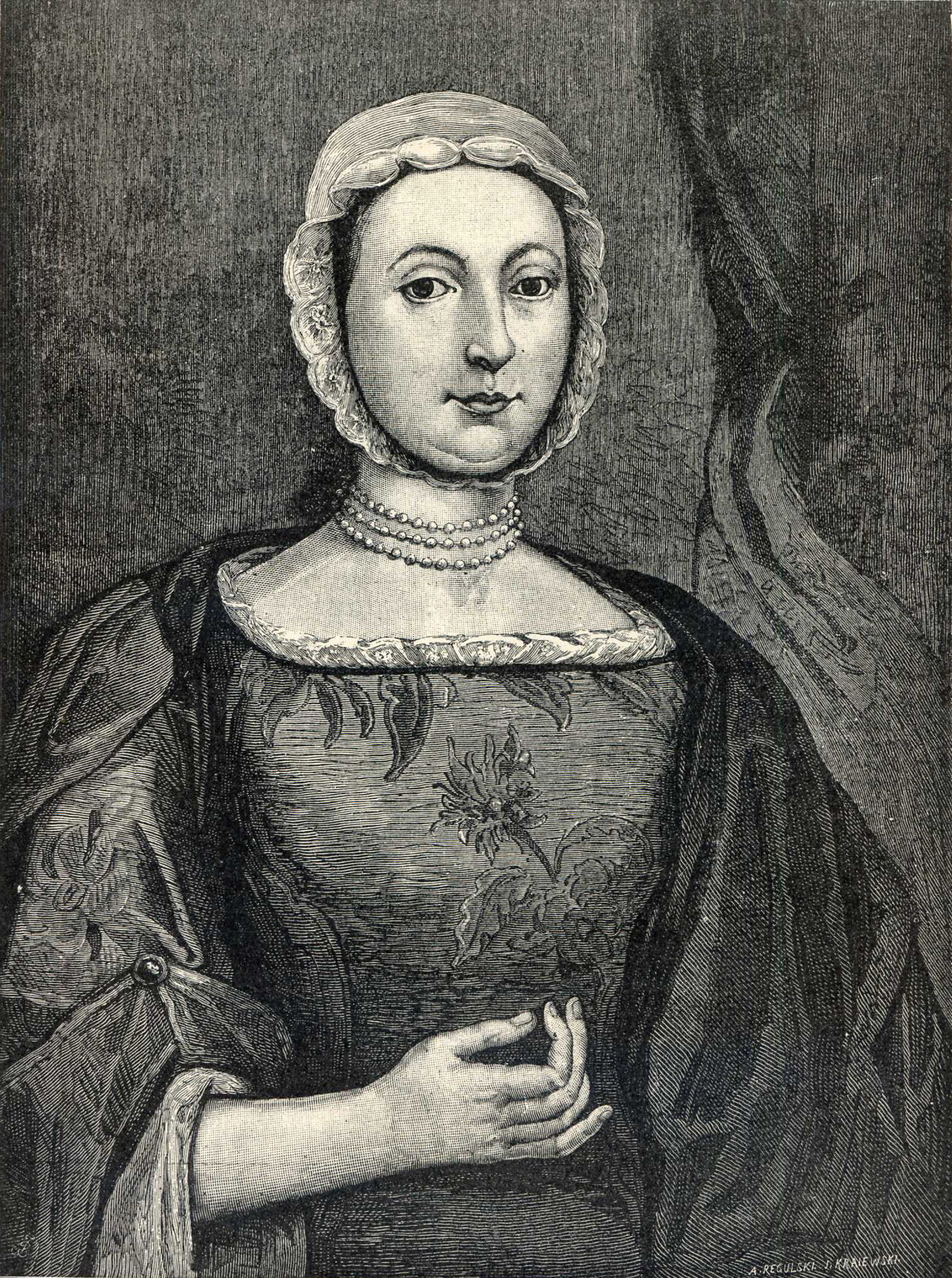 Беларуская (тарашкевіца): Партрэт Барбары Касьцюшкі (Barbara Kaściuška) з роду Глеўскіх (Hleŭski), бабулі Тадэвуша